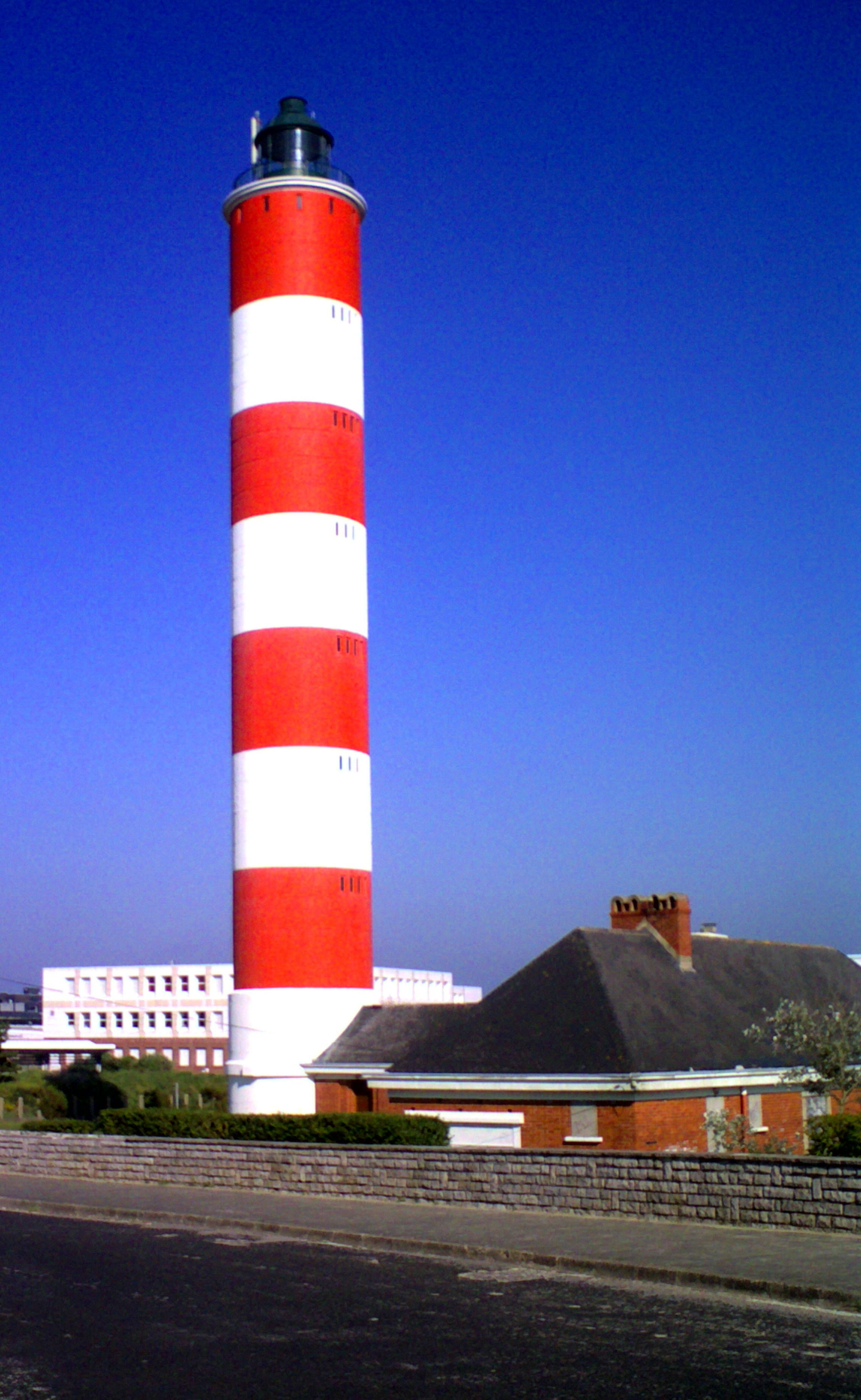 Phare de Berck-sur-Mer